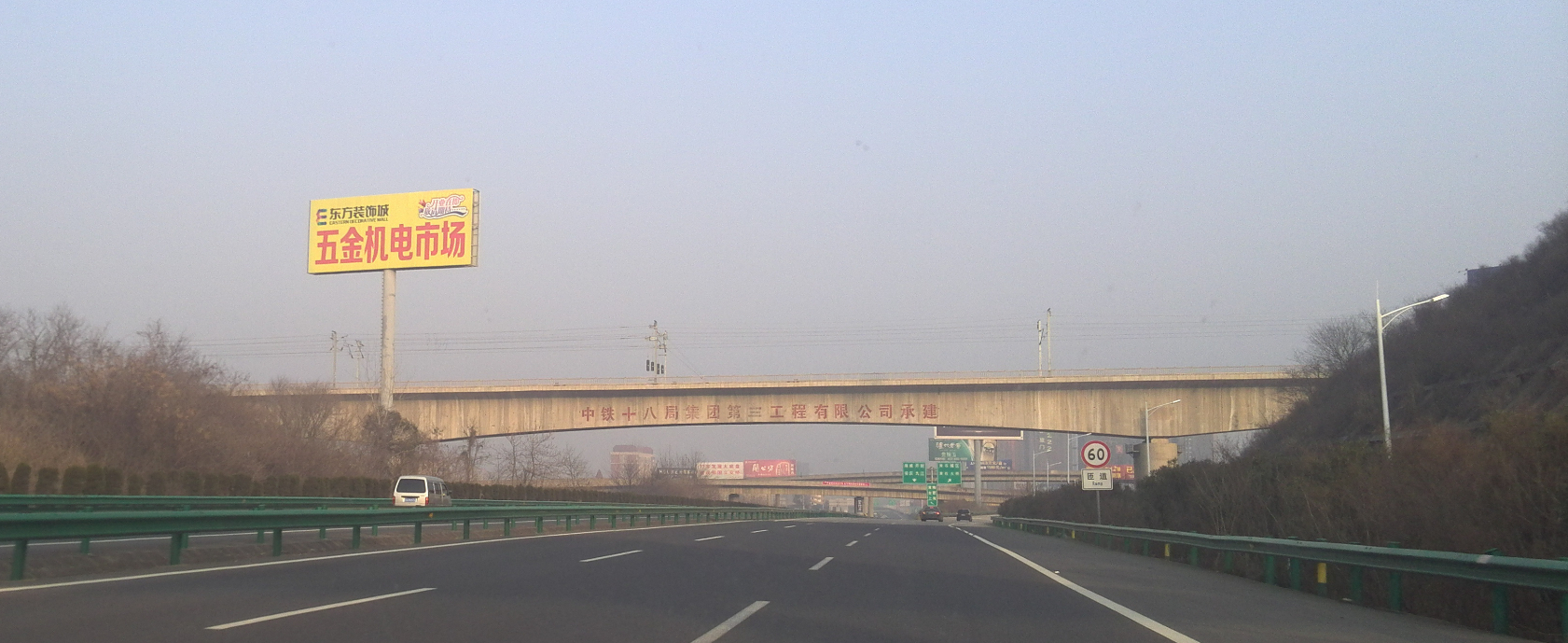 武黄城际铁路花湖段，上跨沪渝高速的大桥